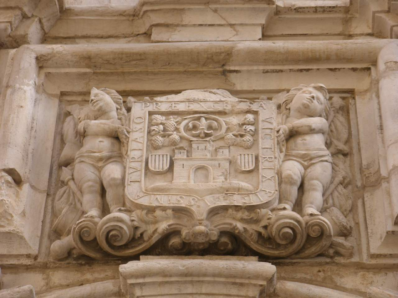 Iglesia de San Atilano (Centro Sociocultural), en Tarazona (Zaragoza)